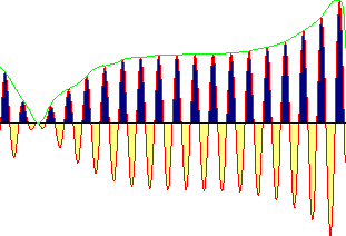 图解傅里叶变换的积分意义，当频率增加时，傅里叶变换等于蓝色部分减去黄色部分后的面积。